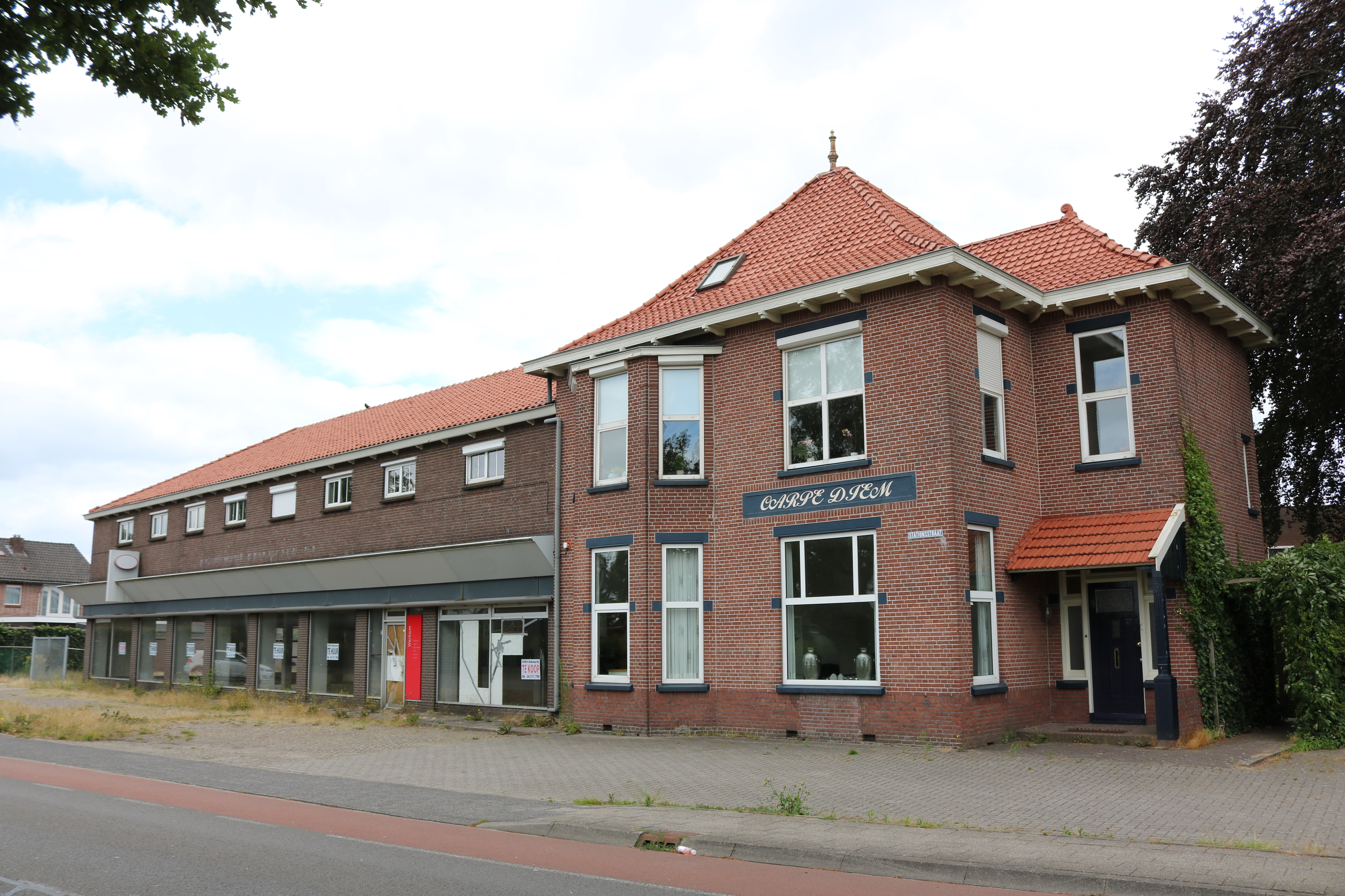 Voormalig tramstation van de EDS in Coevorden, aan de Stationsstraat 34-36 (foto: Daniel van der Ree, 23 juni 2018)